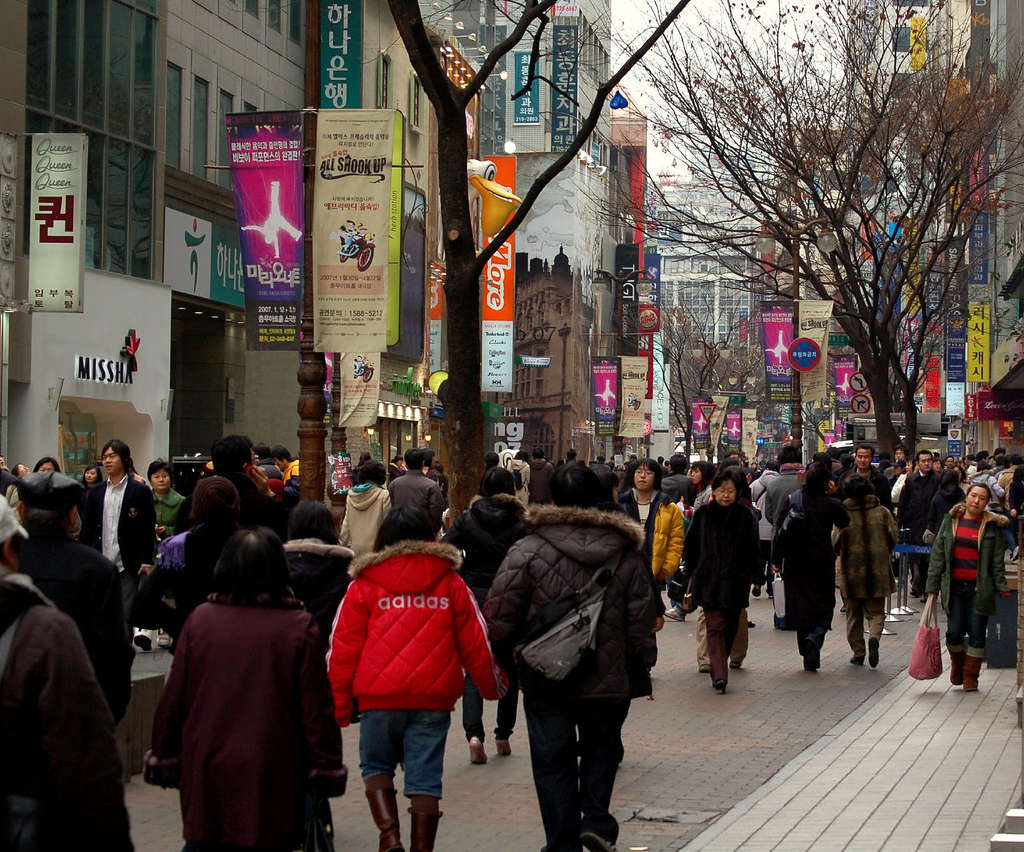 Myeongdong, Seoul